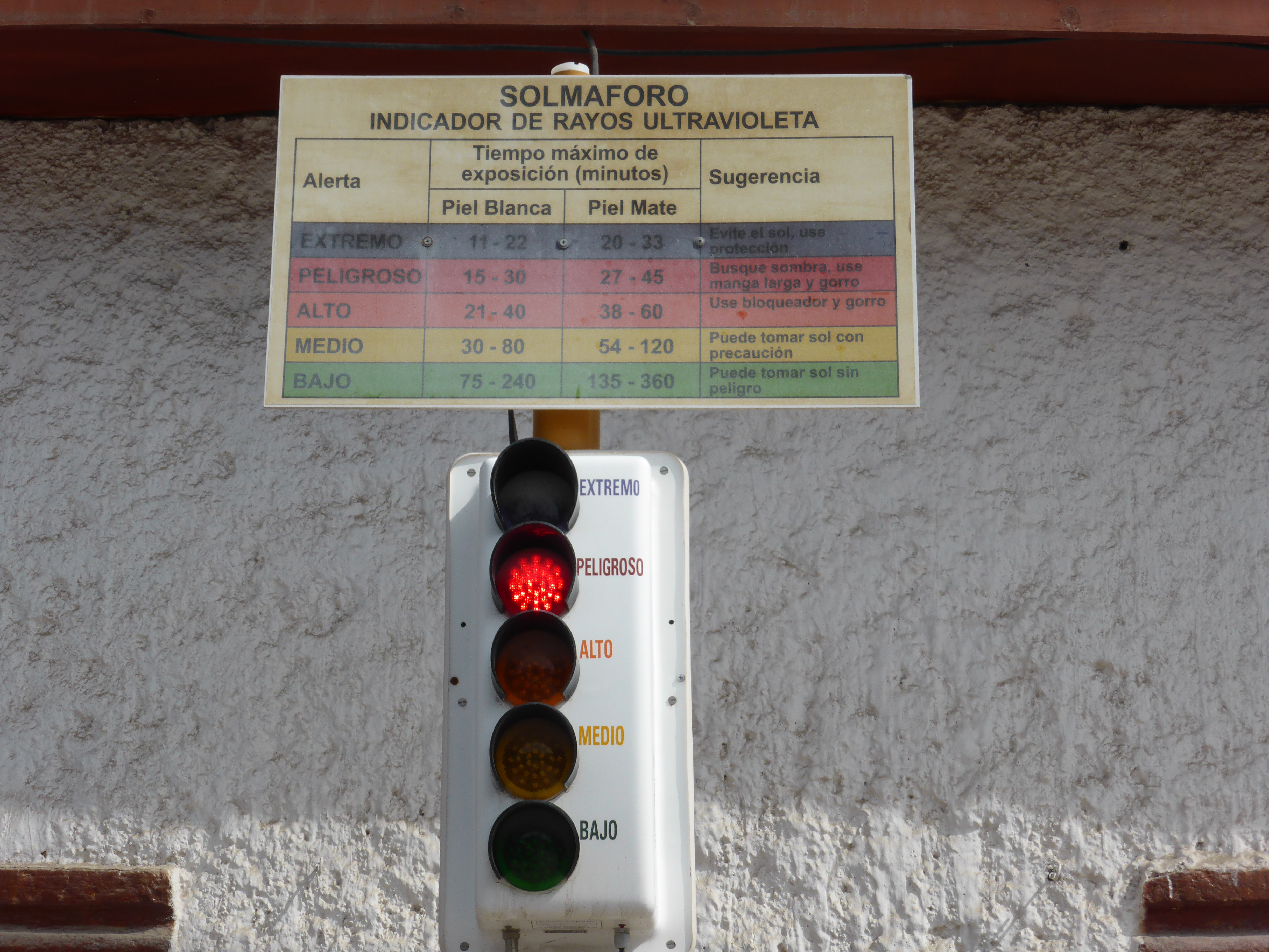 En el norte de Chile se alcanzan elevados niveles de radiación ultravioleta, o radiación UV, en los meses de enero y febrero. Este solmáforo está situado próximo a la iglesia de Putre. La luz roja está alertando del peligro.